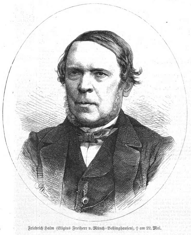 Friedrich Halm, österreichischer Schriftsteller im 19. Jh.